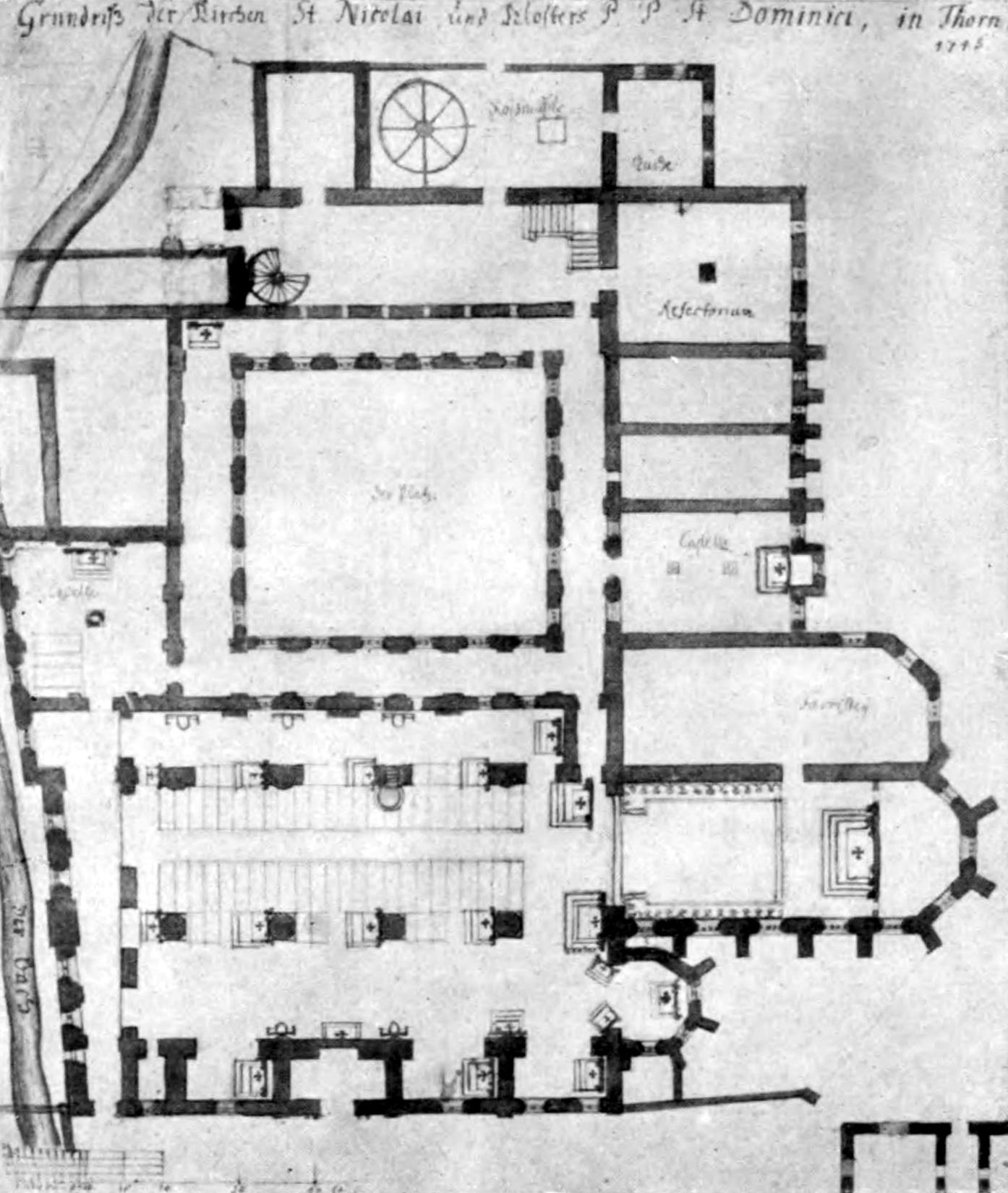 Plan kościoła św. Mikołaja w Toruniu według G.F. Steinera